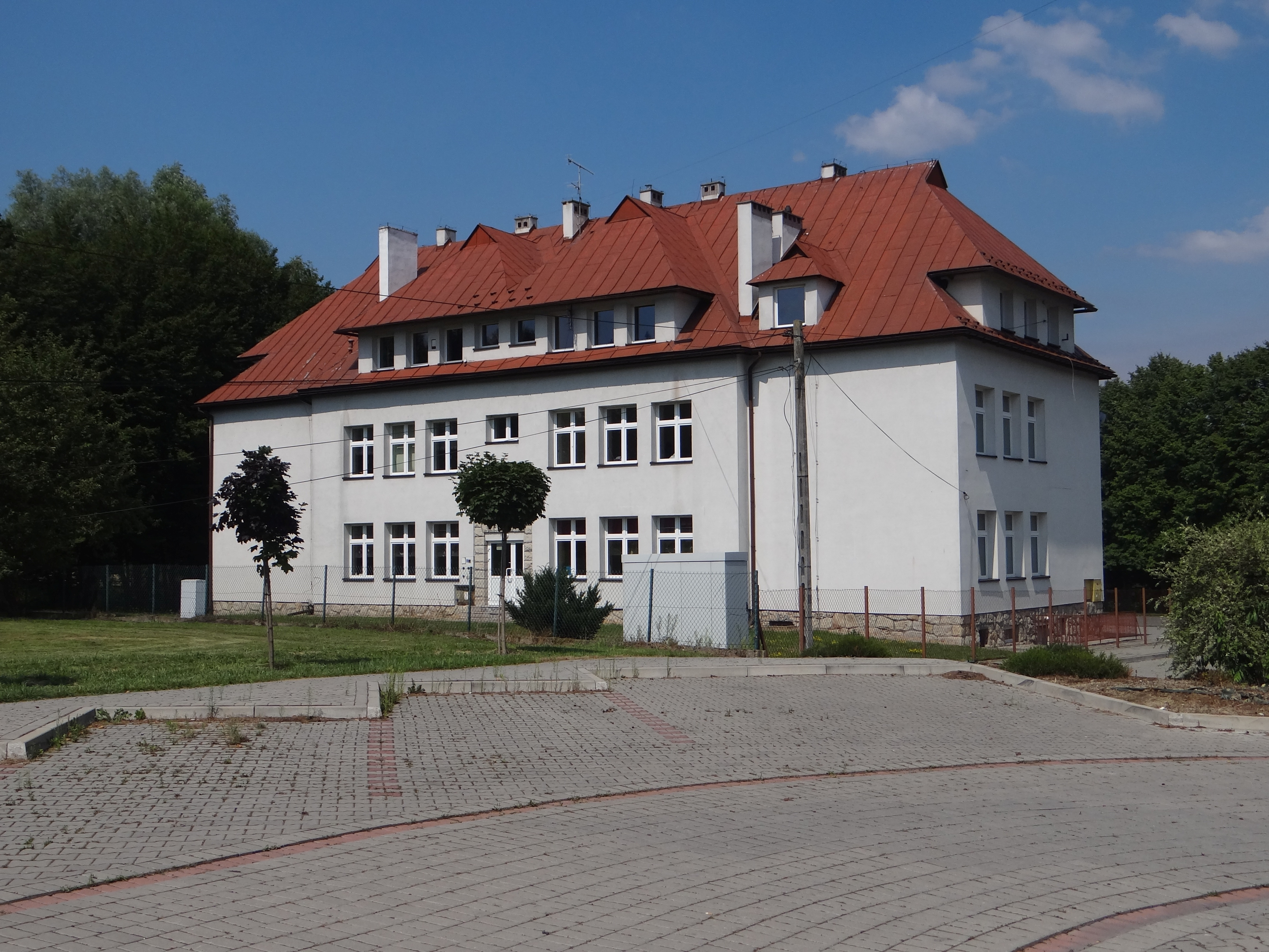 Szkoła w Kątach